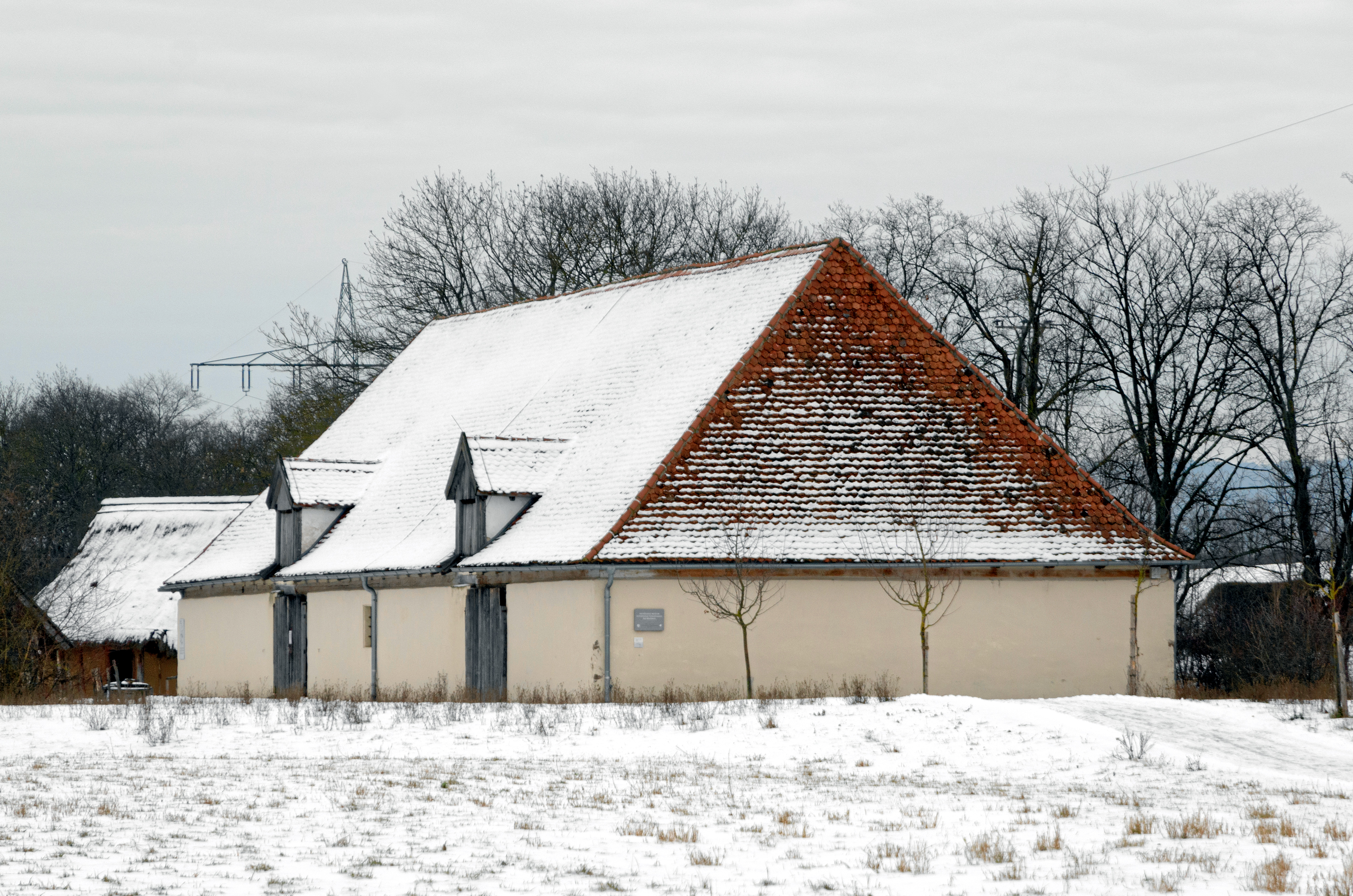 Bad Windsheim, Fränkisches Freilandmuseum, Nr. 104